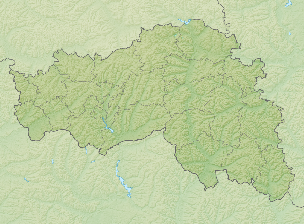 Физическая карта Белгородской областиРавноугольная проекция, растяжение — 155%. Координаты краёв: север — 51.6° С юг — 49.6° С восток — 39.4° В запад — 35.2° В